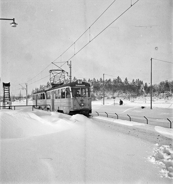 Ängbybanan